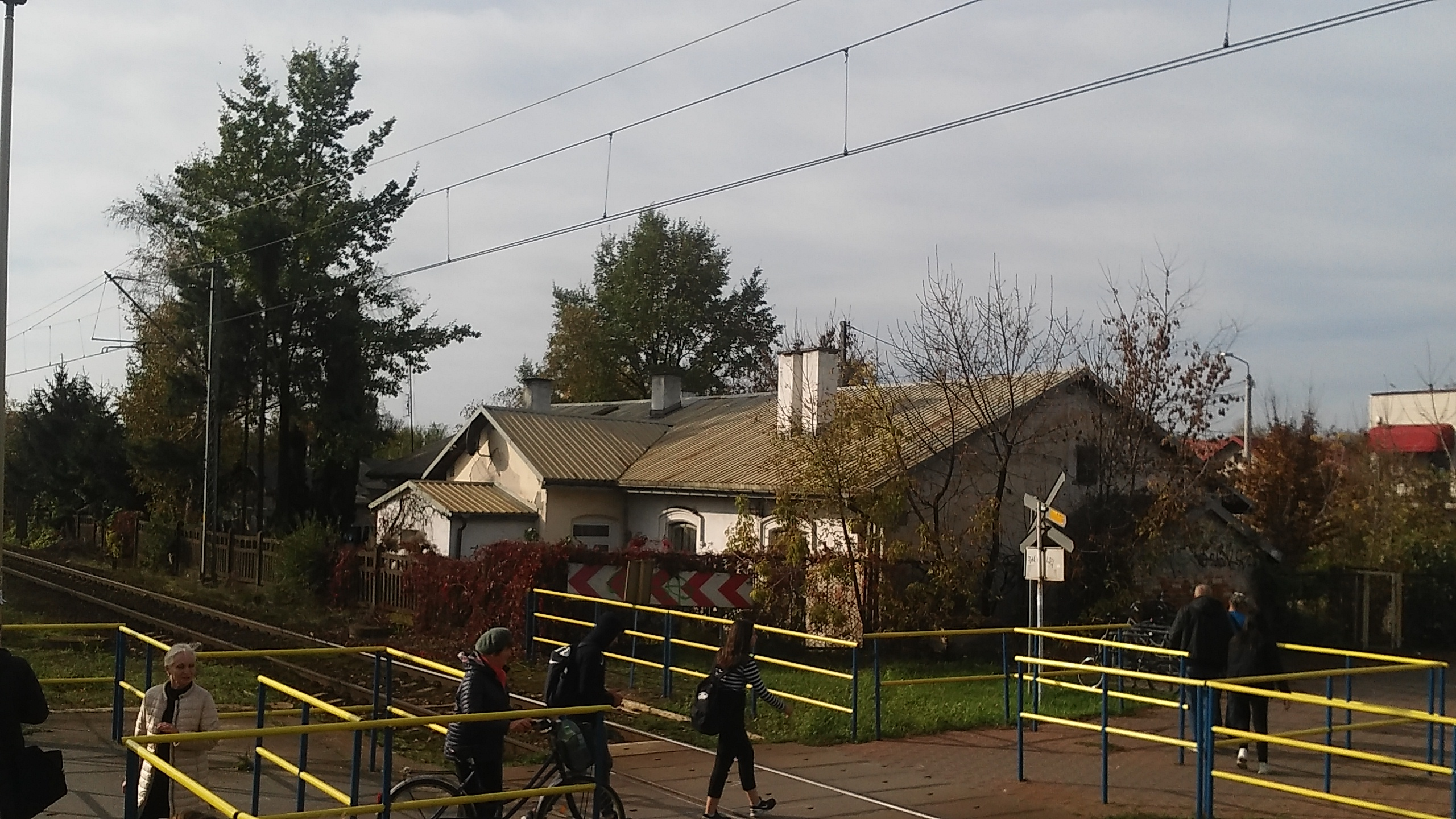 przystanek kolejowy Ząbki - budynek kolejowy z II połowy XIX w. Spełniał rolę kasy biletowej, poczekalni i pomieszczenia dla dyżurnego ruchu.